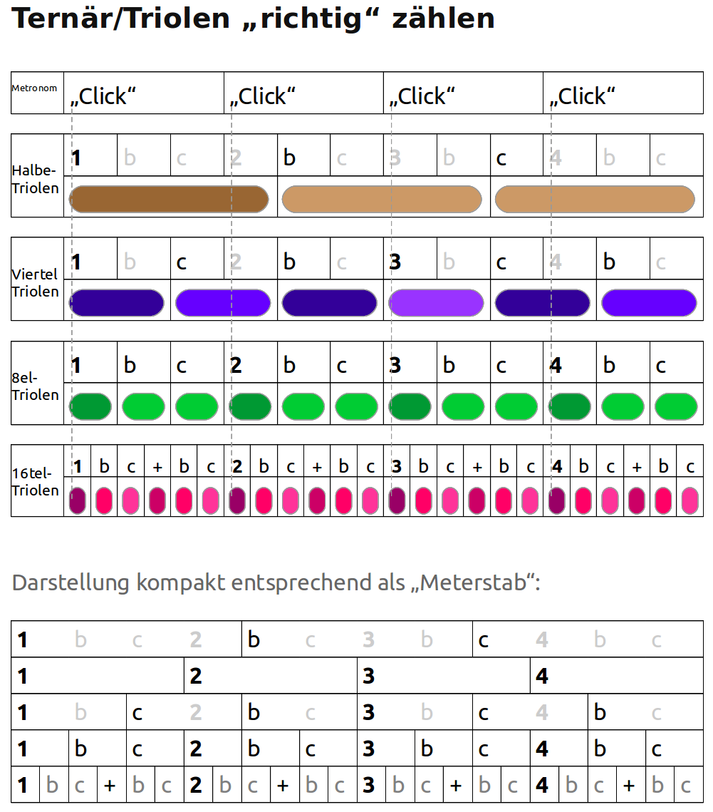 Rhythmus-zählen Baum/Pyramid nur Matrix ternär ohne Noten